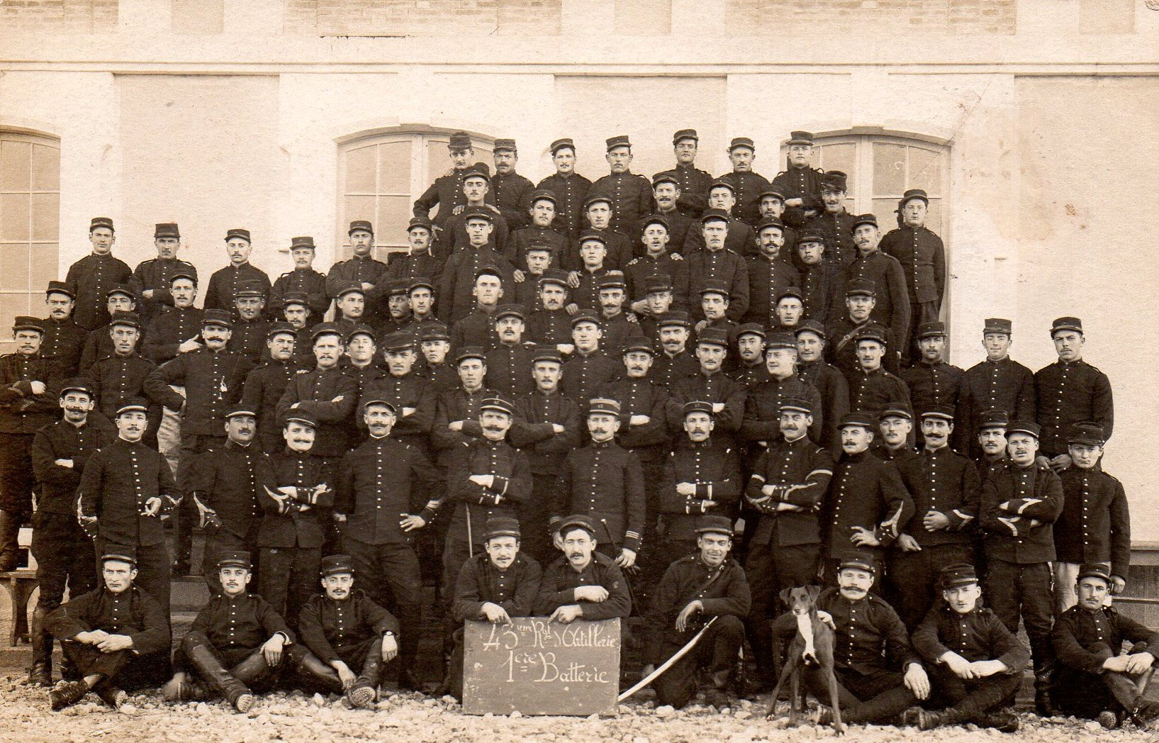 Groupe d'artilleurs, officiers, sous-officiers et hommes du rang composant la première batterie du 43e régiment d'artillerie de campagne. Carte-photo prise à Caen, quartier Claude Decaen (1914?)